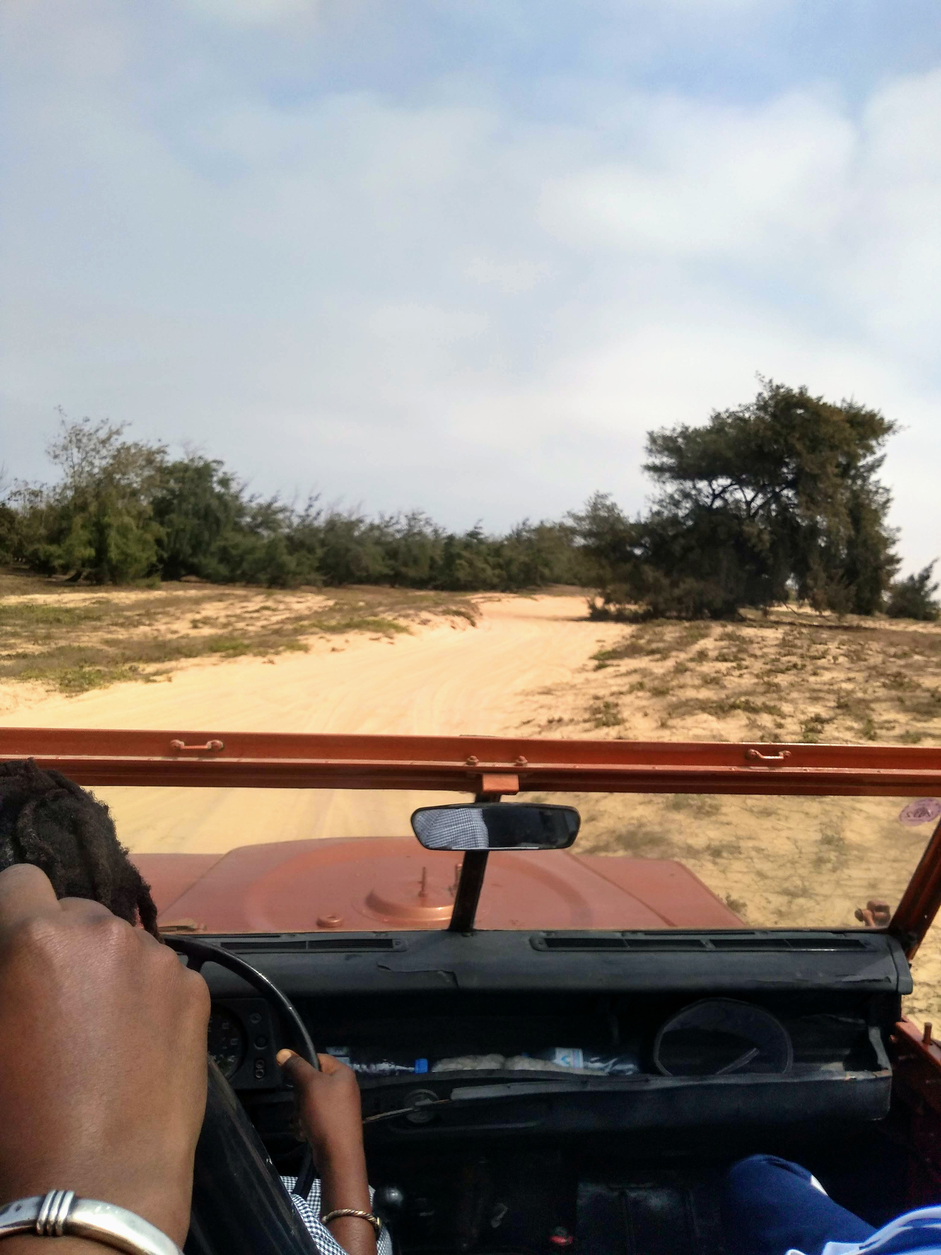 Balade en 4×4 sur le Parcours Paris Dakar dans les dunes près du Lac Rose This is an image with the theme "Africa on the Move or Transport" from: Senegal